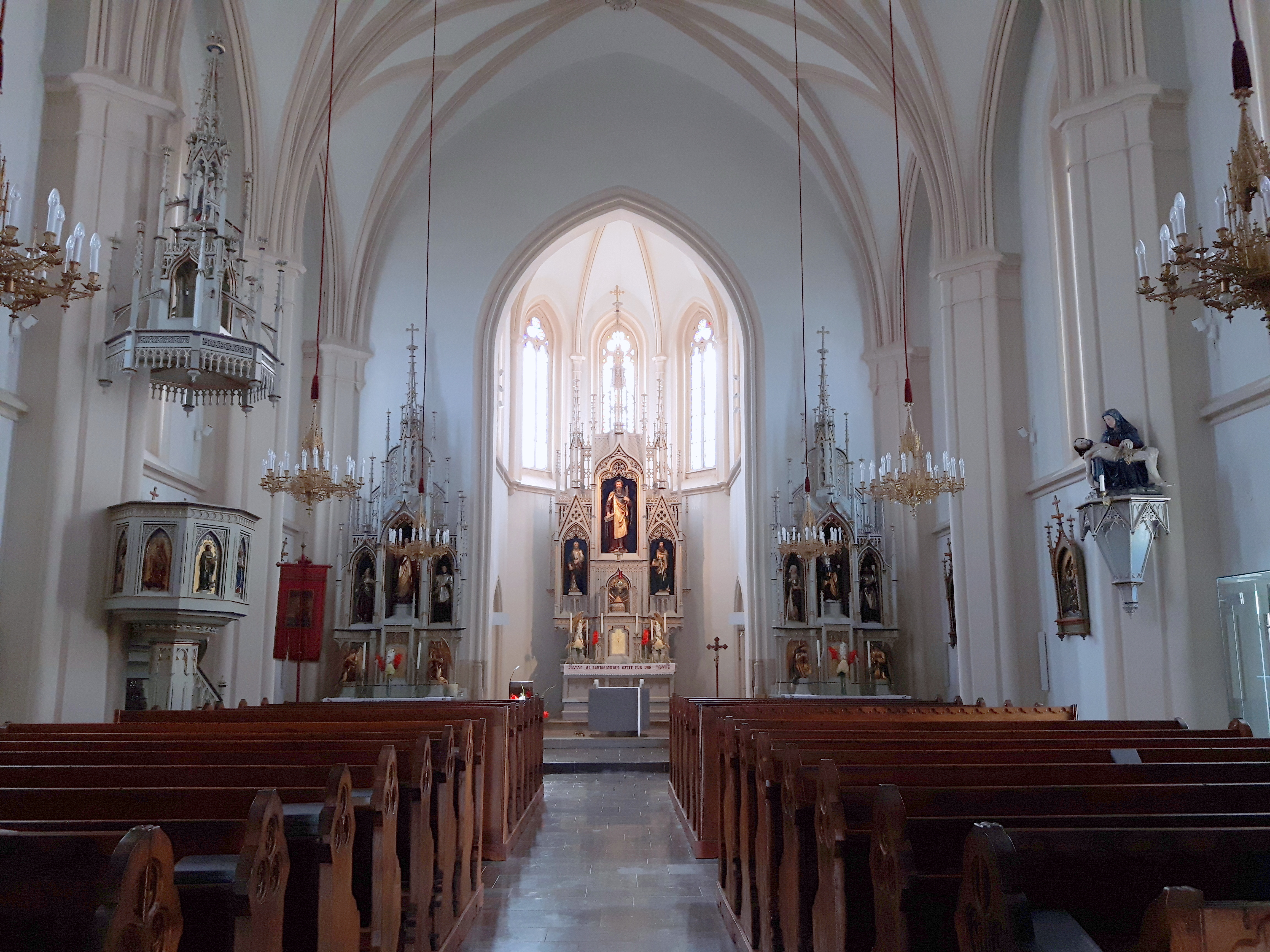 Blick vom Haupteingang auf den Innenraum der Kath. Pfarrkirche St. Bartholomä